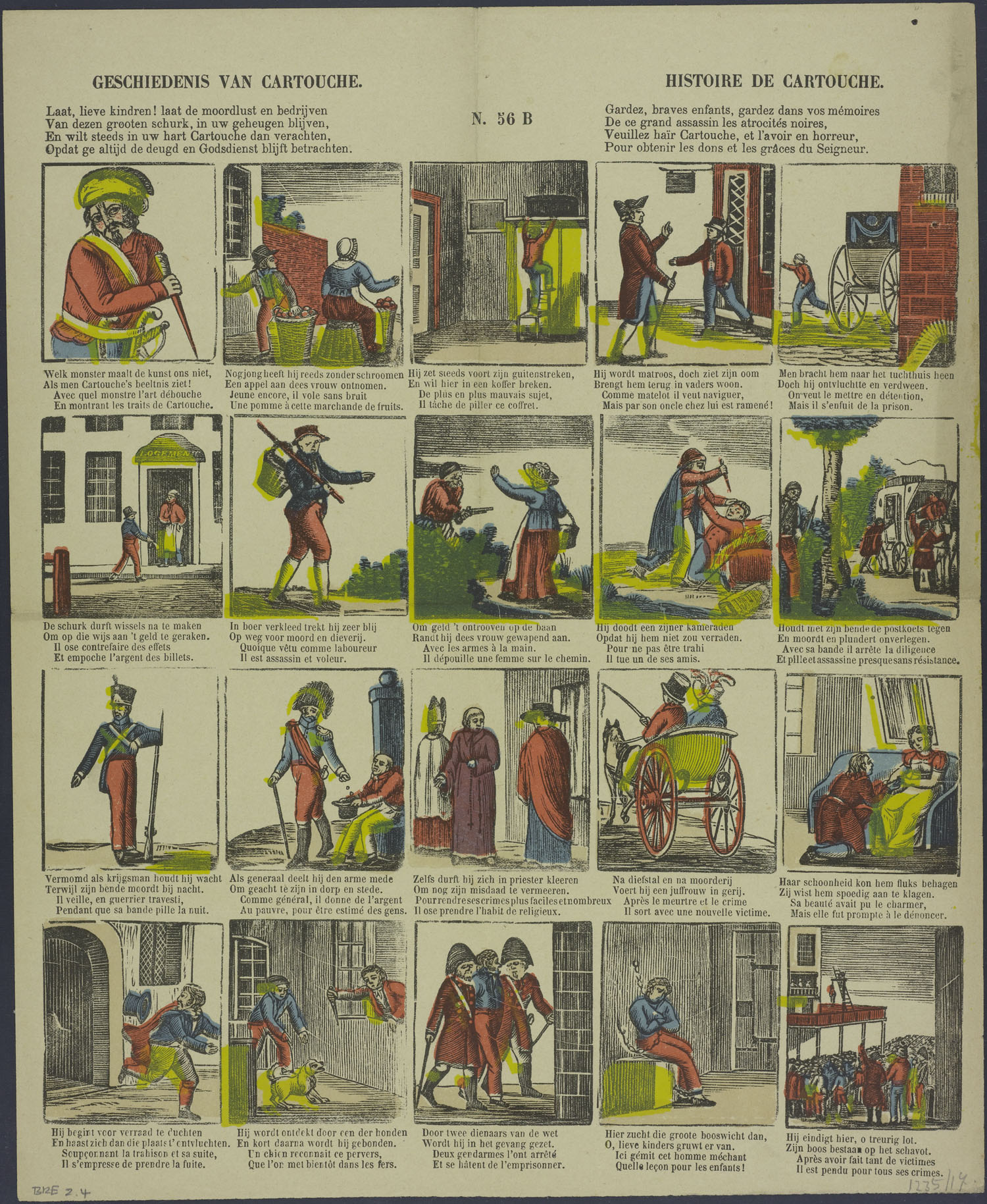 Centsprent met 4 x 5 houtsneden, met afbeeldingen uit het leven van de schurk Cartouche, zoals diefstal, tuchthuis, het namaken van wissels, doodslag, overval op een postkoets, vermomming als soldaat, generaal en priester. Hij rijdt in een koets met een dame, wordt verraden, aangeklaagd, gevangen gezet en opgehangen. Bevat rijmende onderschriften in Nederlands en Frans.